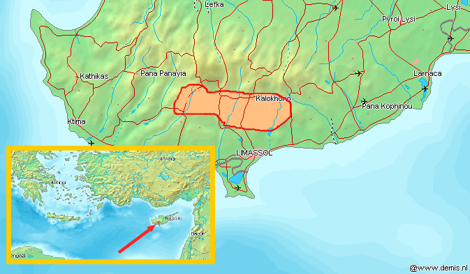 Commendaria Wine Region